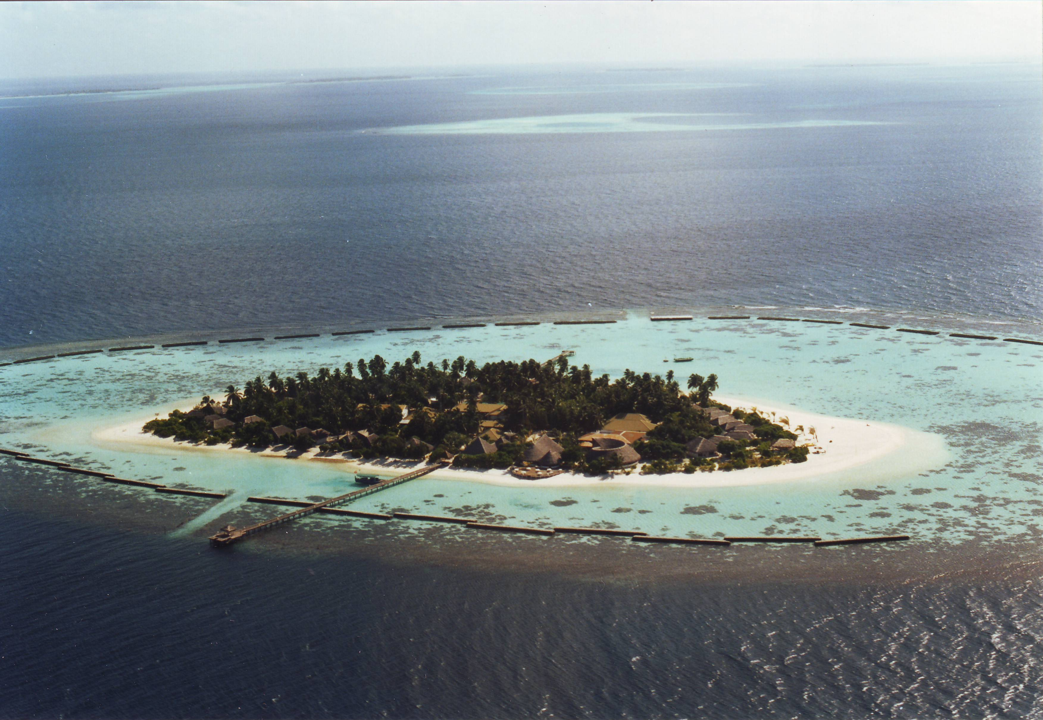 Vakarufahli Island - South Ari Atoll - Maldives